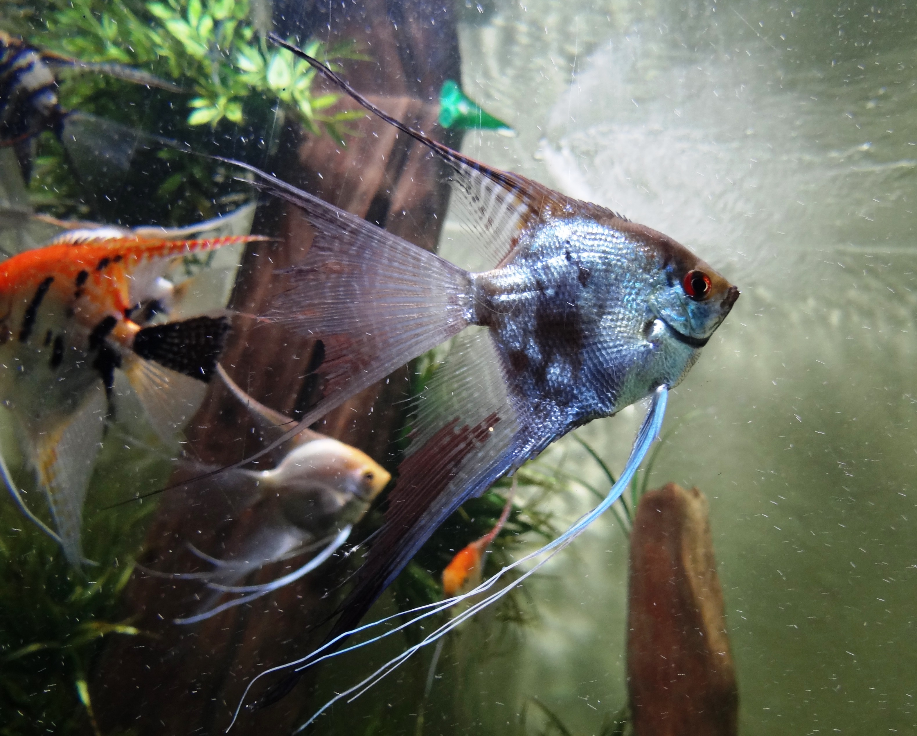 Escalar o pez ángel (Pterophyllum scalare) en el acuario del Zoológico de Cali, Colombia